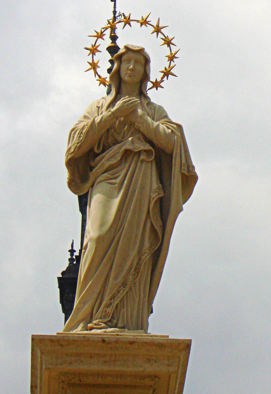 Zespół klasztorny oo. Paulinów: Kościół pw. Wniebowzięcia NMP i Znalezienia Krzyża Św. z kaplicami, zakrystią, skarbcem, wieżą, klasztorem, zabudowaniami gospodarczymi, arsenałem, drukarnią, domem muzykantów, twierdzą z bramami i bastionami, park Częstochowa, Częstochowa 02.1978.